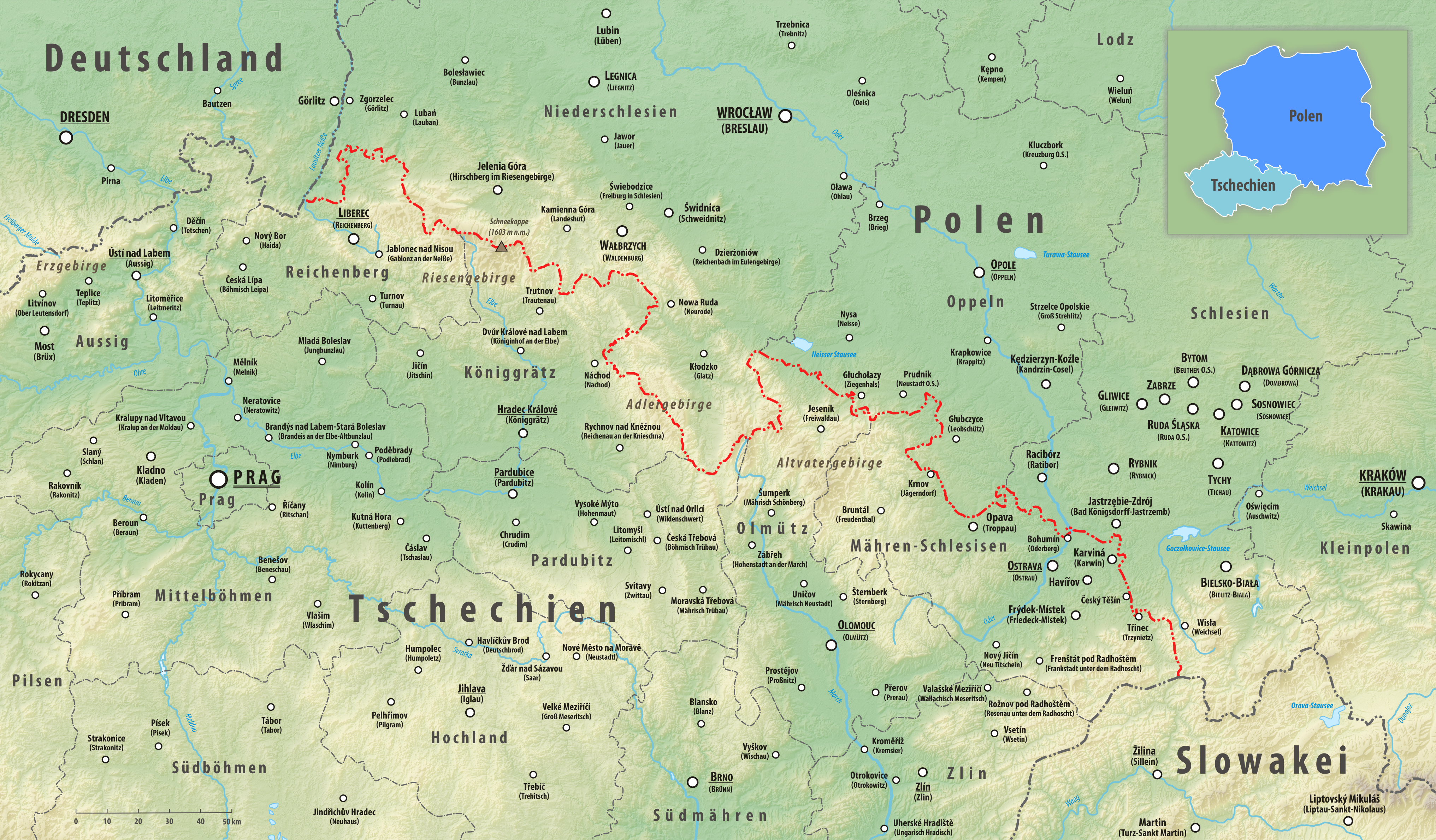 Reliefkarte des Grenzverlaufes zwischen Tschechien und Polen Topographischer Hintergrund: NASA Shuttle Radar Topography Mission (public domain). SRTM3 v.2.